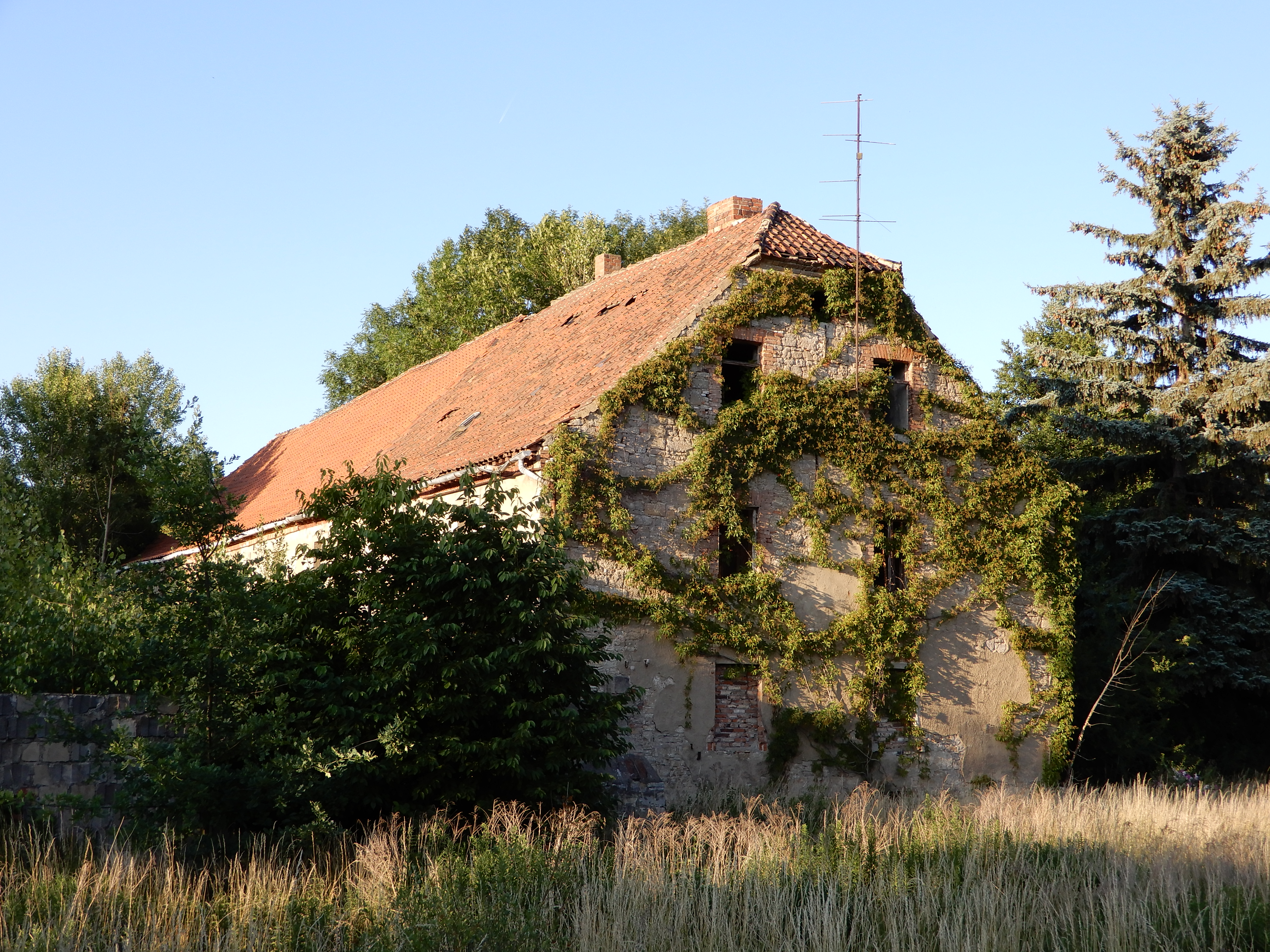 Gatersleben, Mühlenweg 8